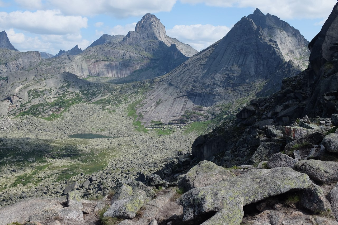 Ергаки, Ермаковский район This image is related to the protected area of Russia number 2410078